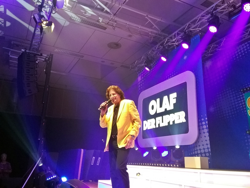 Olaf Malolepski „Die Große Schlager-Hitparade 2017“ in Erkner